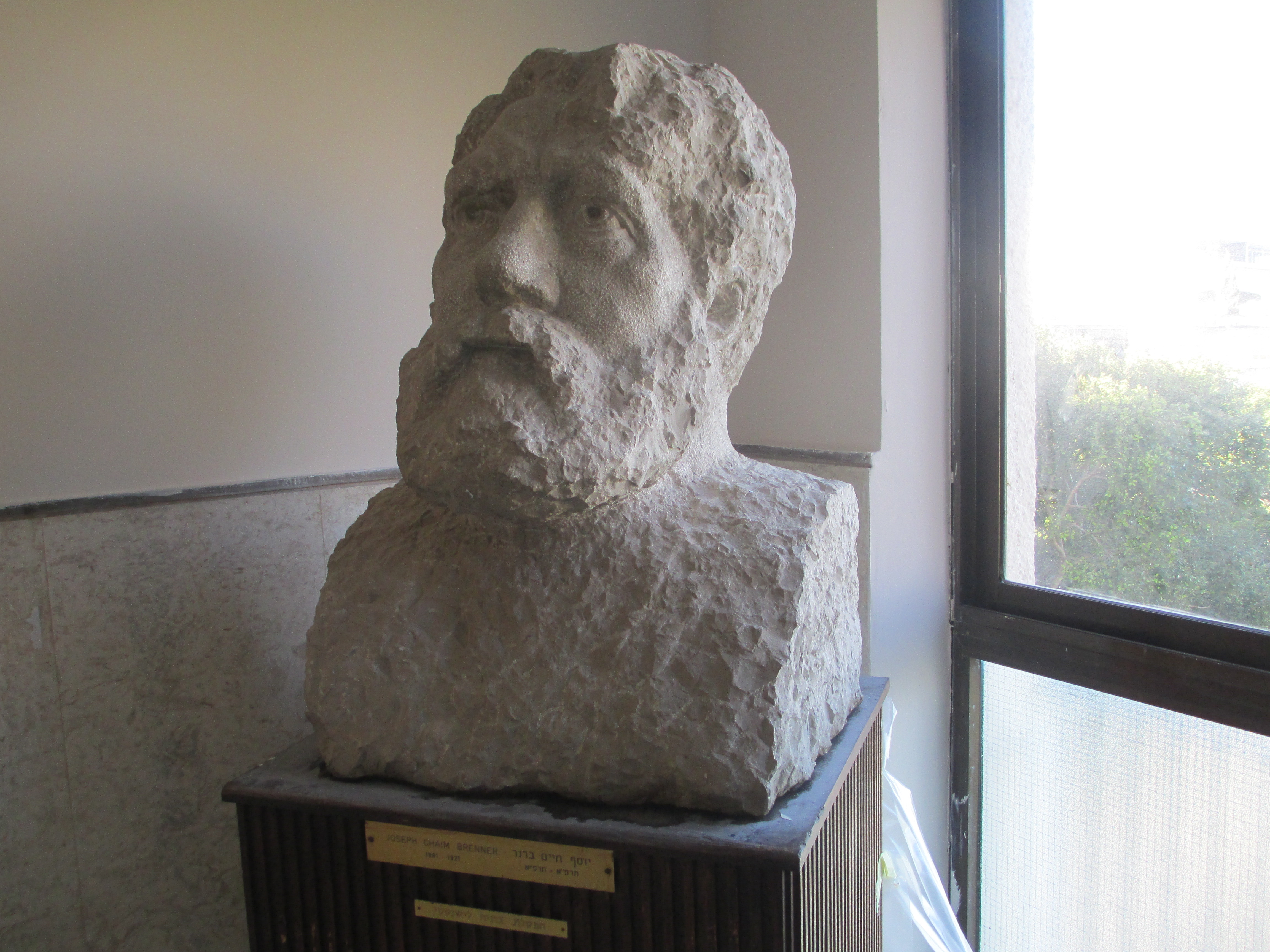 פסל של י.ח. ברנר מאת בתיה לישנסקי